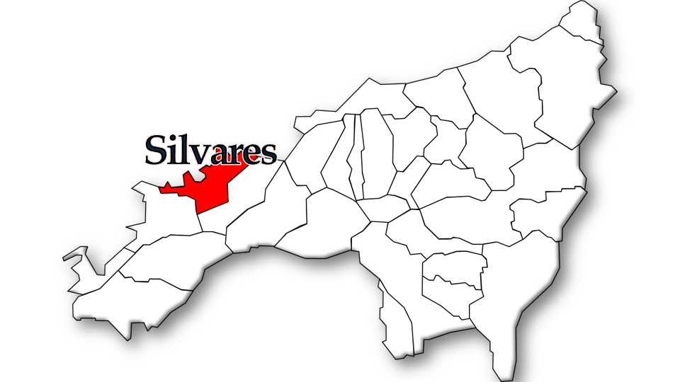 População